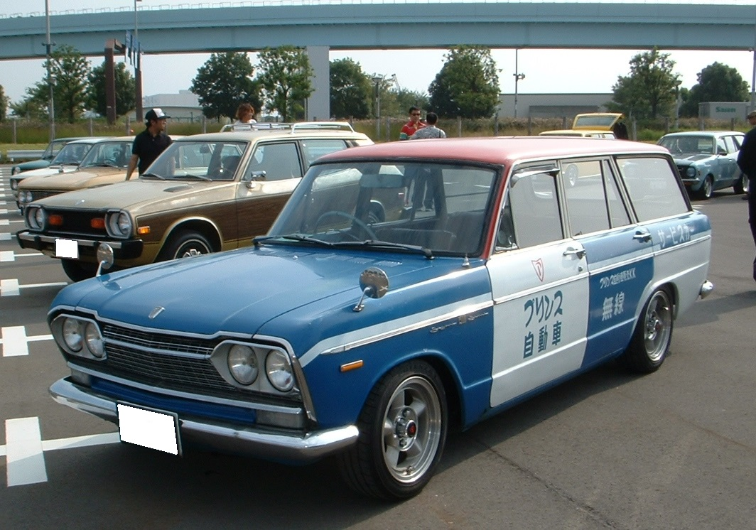 ニッサン・プリンス・スカイライン1500バン・デラックス（V51B型）前部